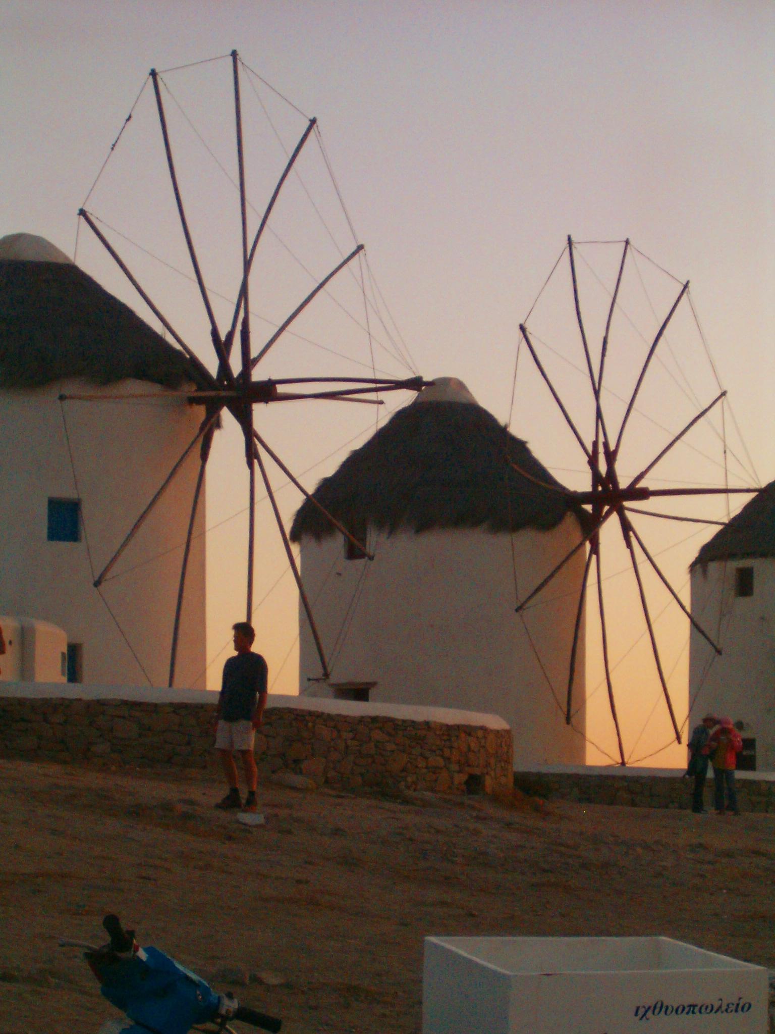 Brisckerly - Opera sua - Mykonos (Micono)